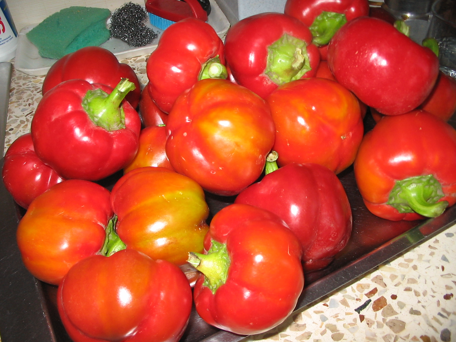 Овочі ротунди.